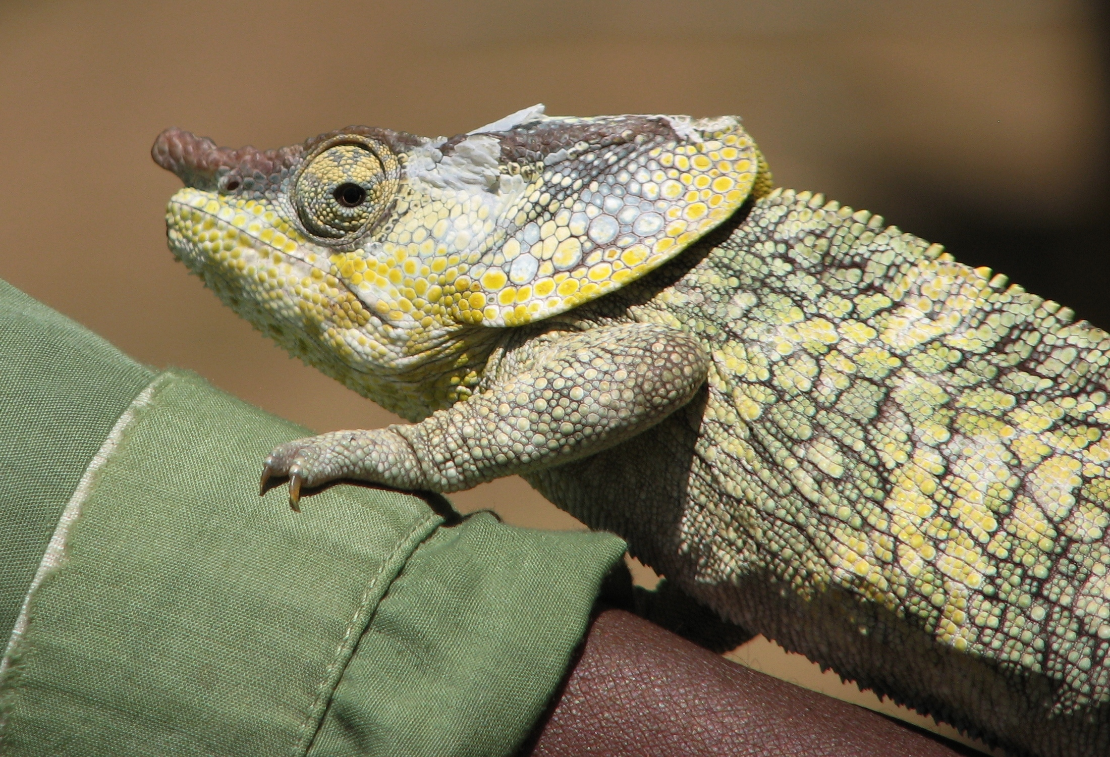 Männliches Kurzhorn-Chamäleon (Calumma brevicorne) im Exotic Park in Marozevo, Madagaskar